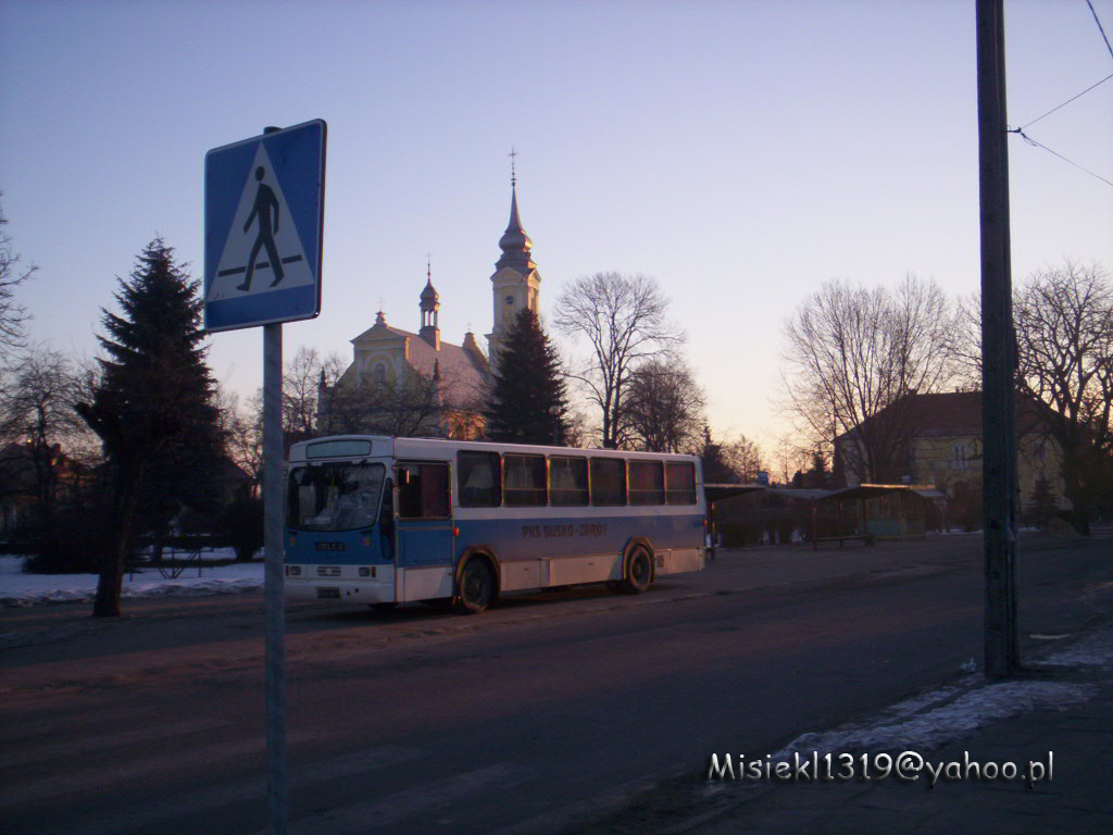 Widok Szczucina Autor: Michał Lebida